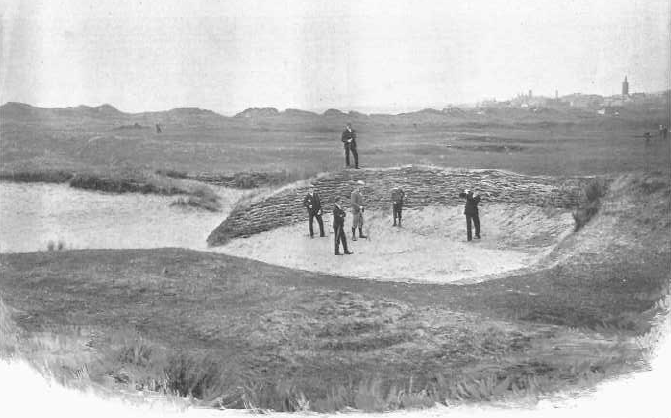 Hell Bunker, Old Course, St Andrews, Scotland